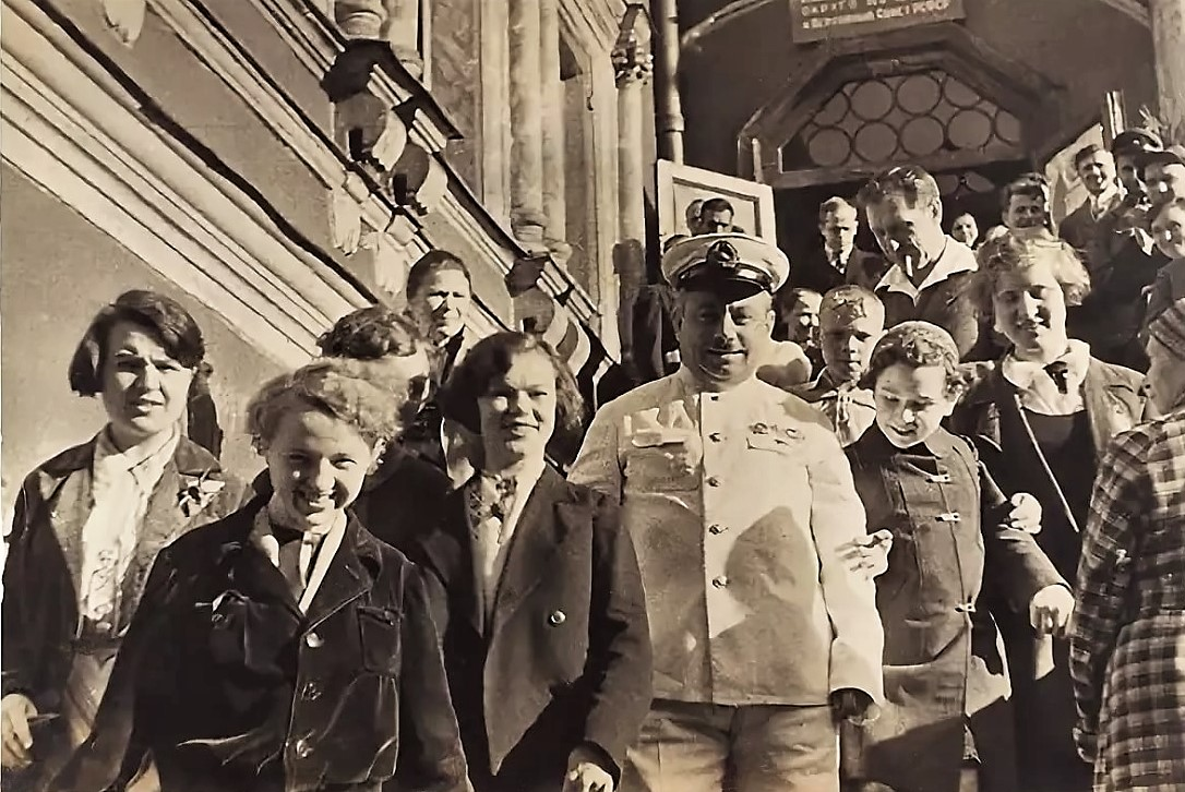 Герой Советского Союза И. Д. Папанин среди избирателей 7-го участка Куйбышевского избирательного округа города Москвы.